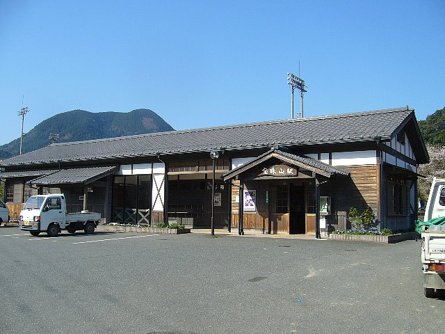 日田彦山線宝珠山駅 駅舎 2006年3月 Bakkai撮影